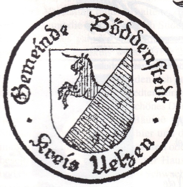 Wappen der bis 1972 eigenständigen Gemeinde Böddenstedt, Suderburg.